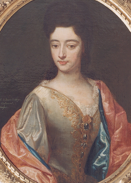 Marie-Isabelle de Bavière de Schagen, comtesse d'Oultremont de Warfusée